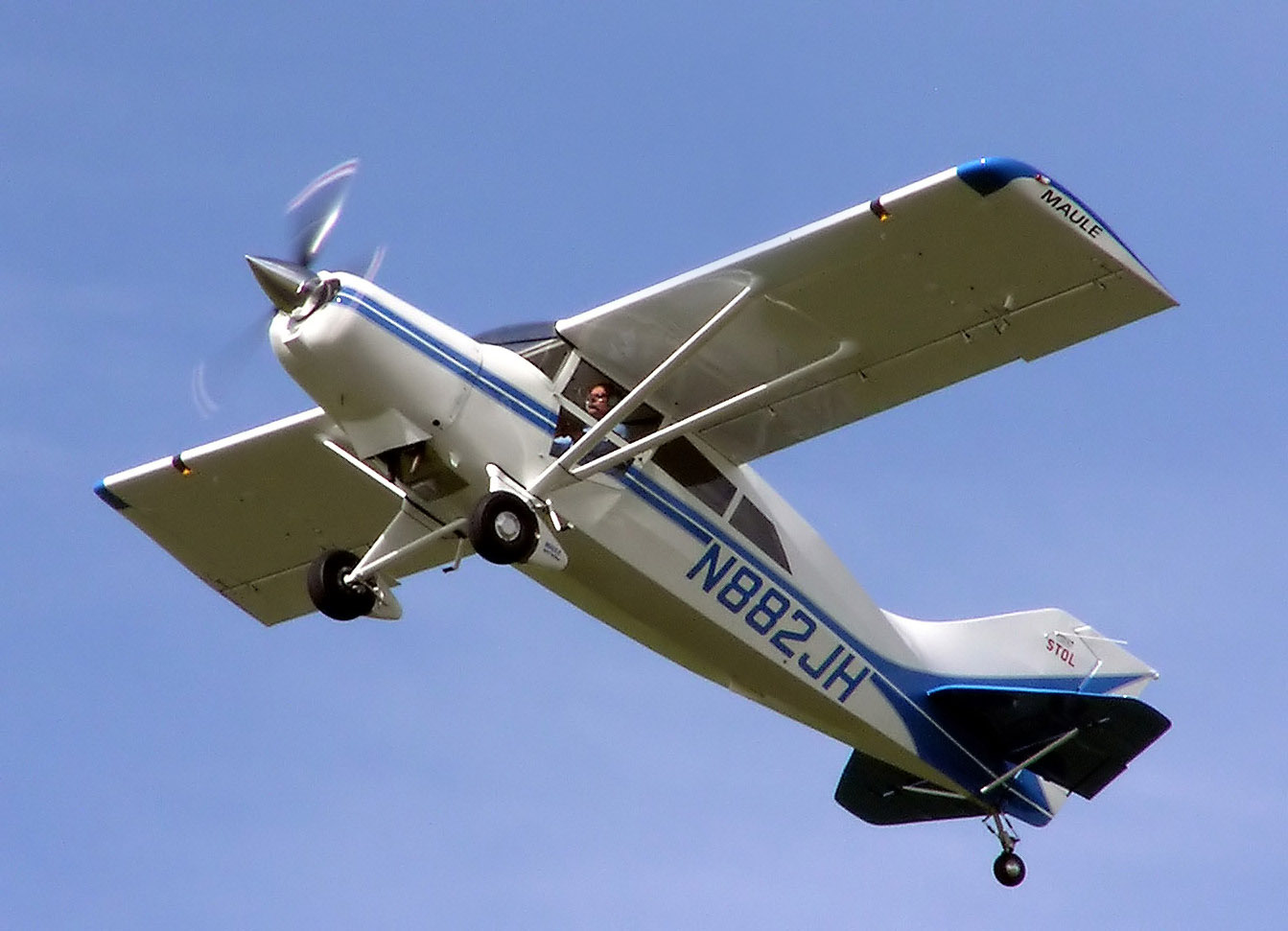 Alas rectas de un avión ligero Maule M-7-235B Super Rocket Maule M7-235B light aircraft (US registration N882JH) takes off at Kemble Airfield, Gloucestershire, England. Built in 1999. Photographed by Adrian Pingstone in July 2005 and released to the public domain.